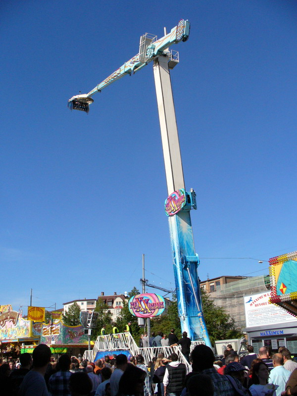 Cannstatter Volksfest Maxximum-Fahrgeschäft